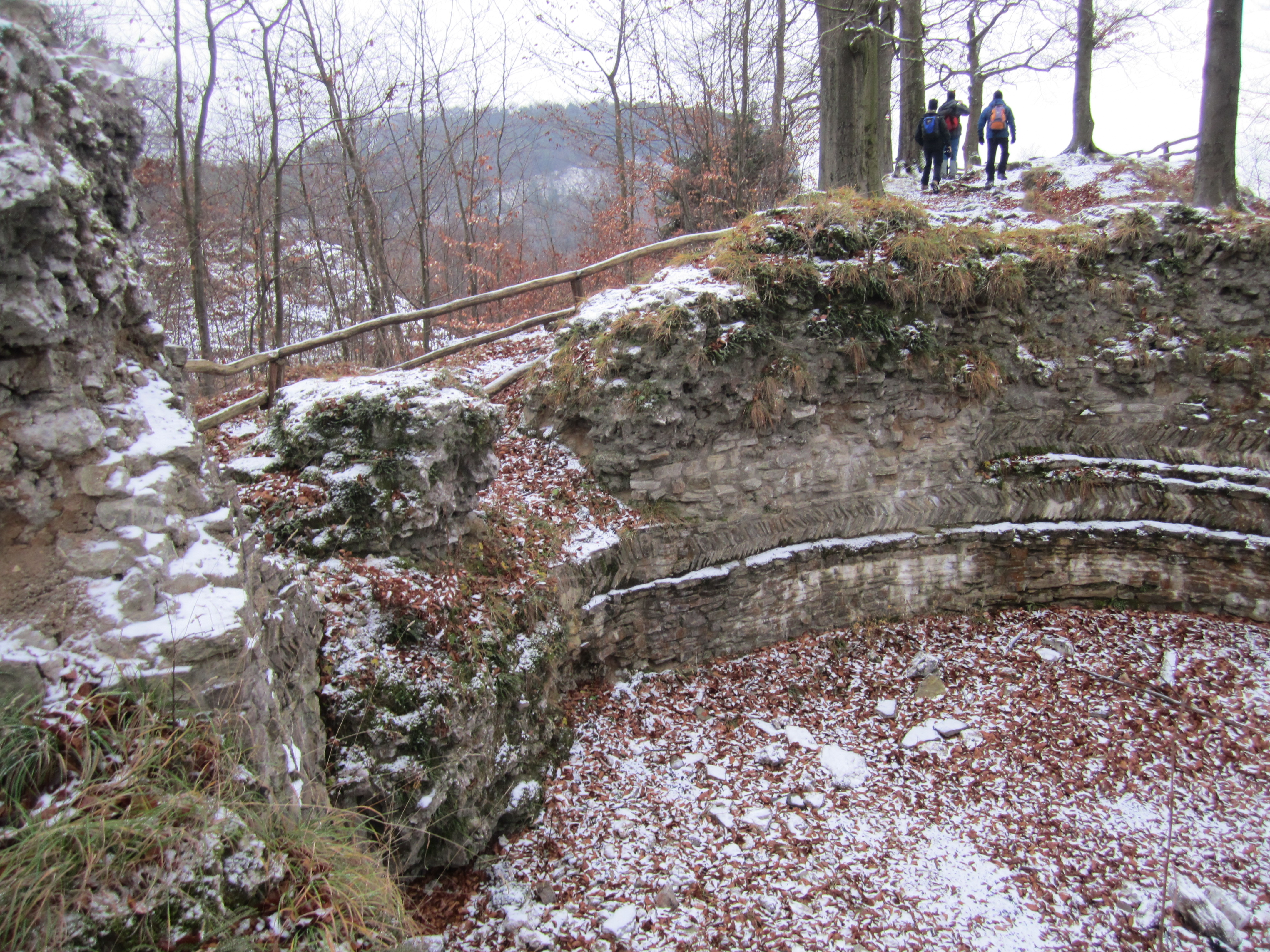 Mauerwerksreste des Bergfrieds der Burgruine Sachsenstein. Bad Sachsa, Niedersachsen, Deutschland.